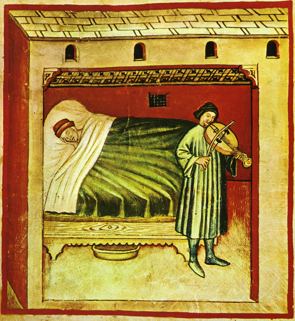 Tacuina sanitatis (XIV century) 1-aspetti di vita quotidiana, sonno,Taccuino Sanitatis, Cas